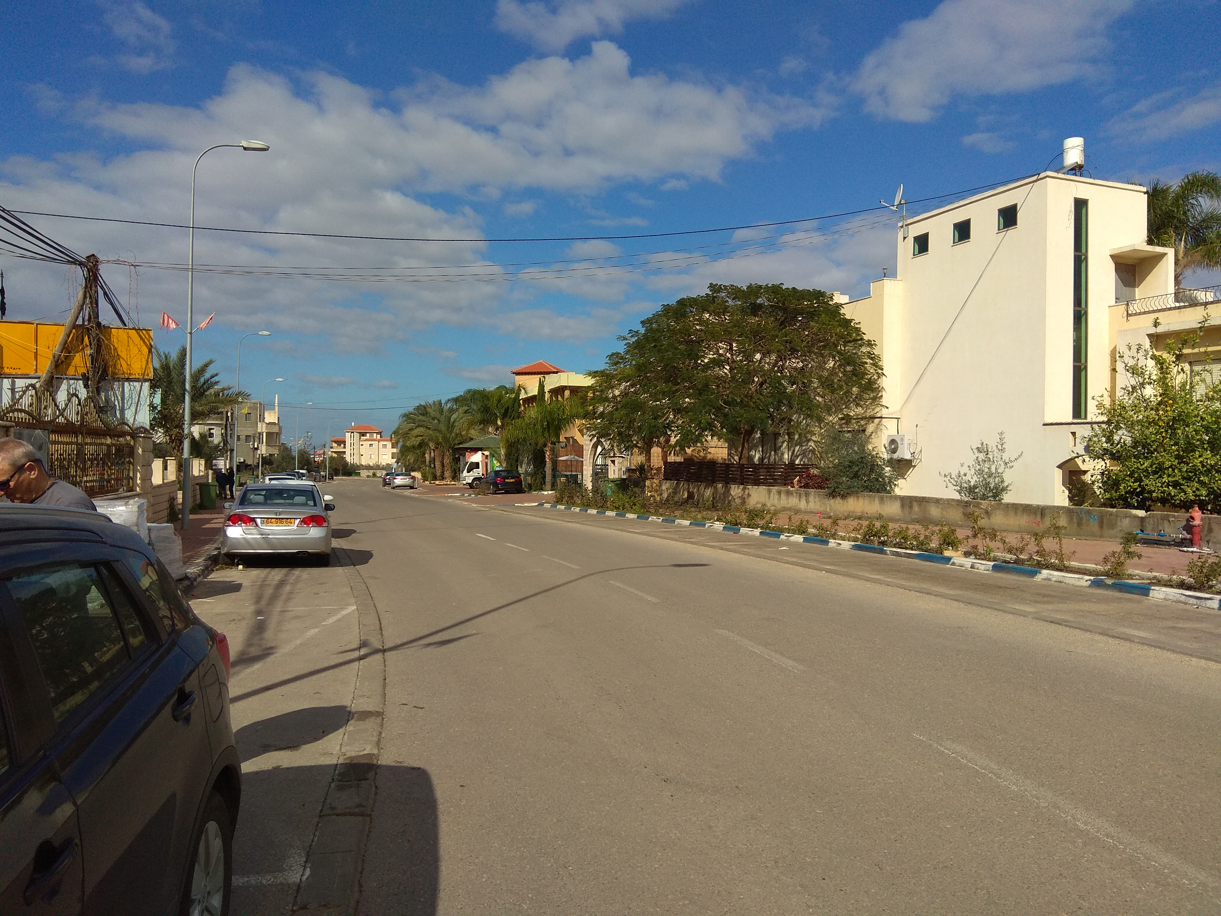 כאבול, כביש ראשי